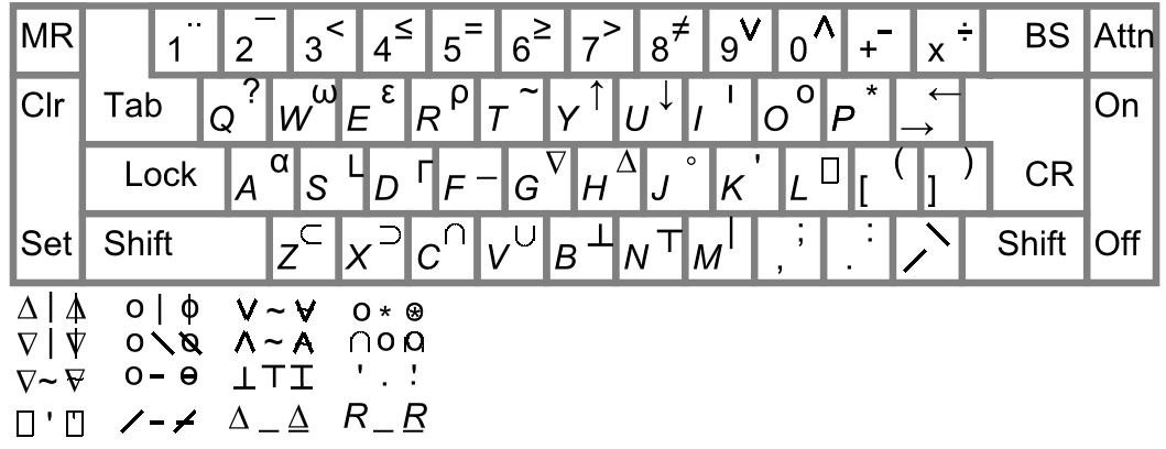 APL keyboard